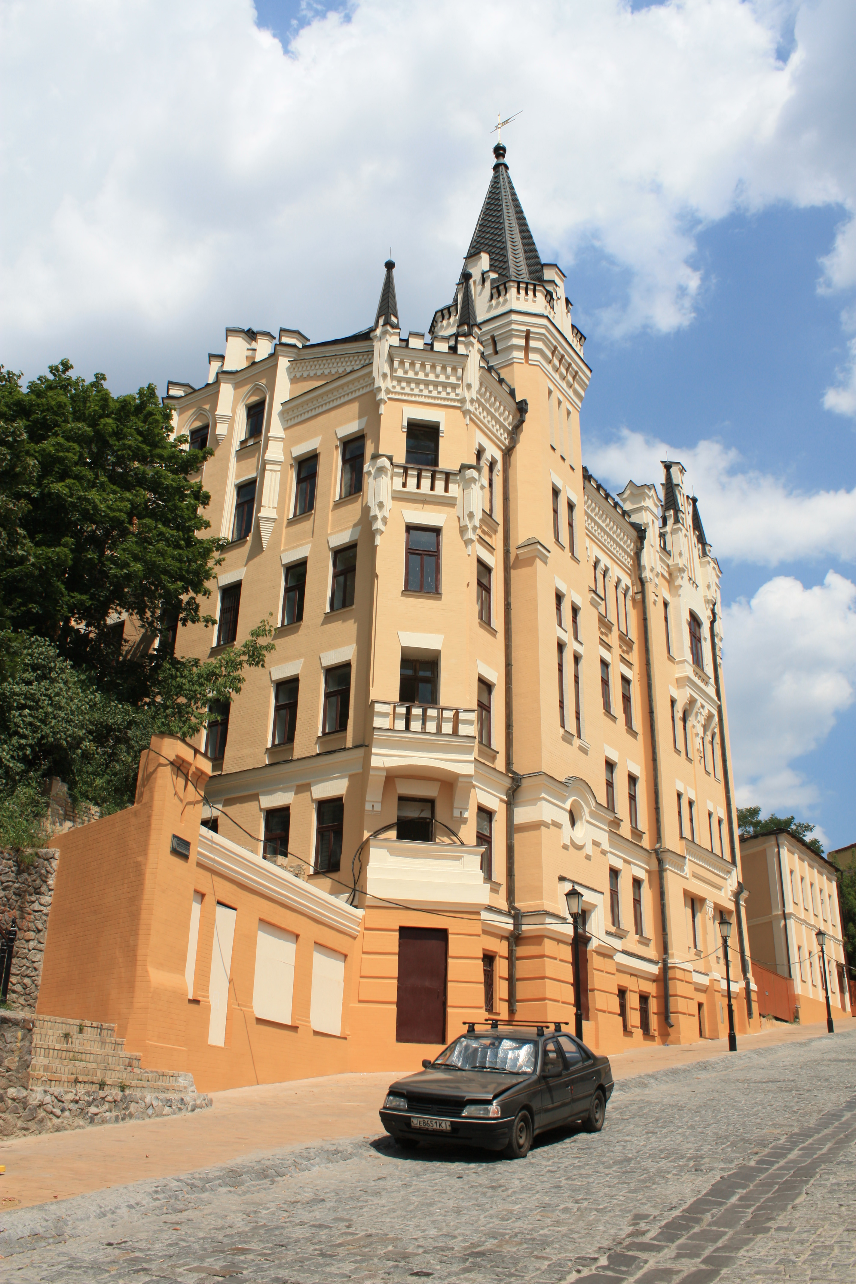 Київ, Андріївський узвіз, 15